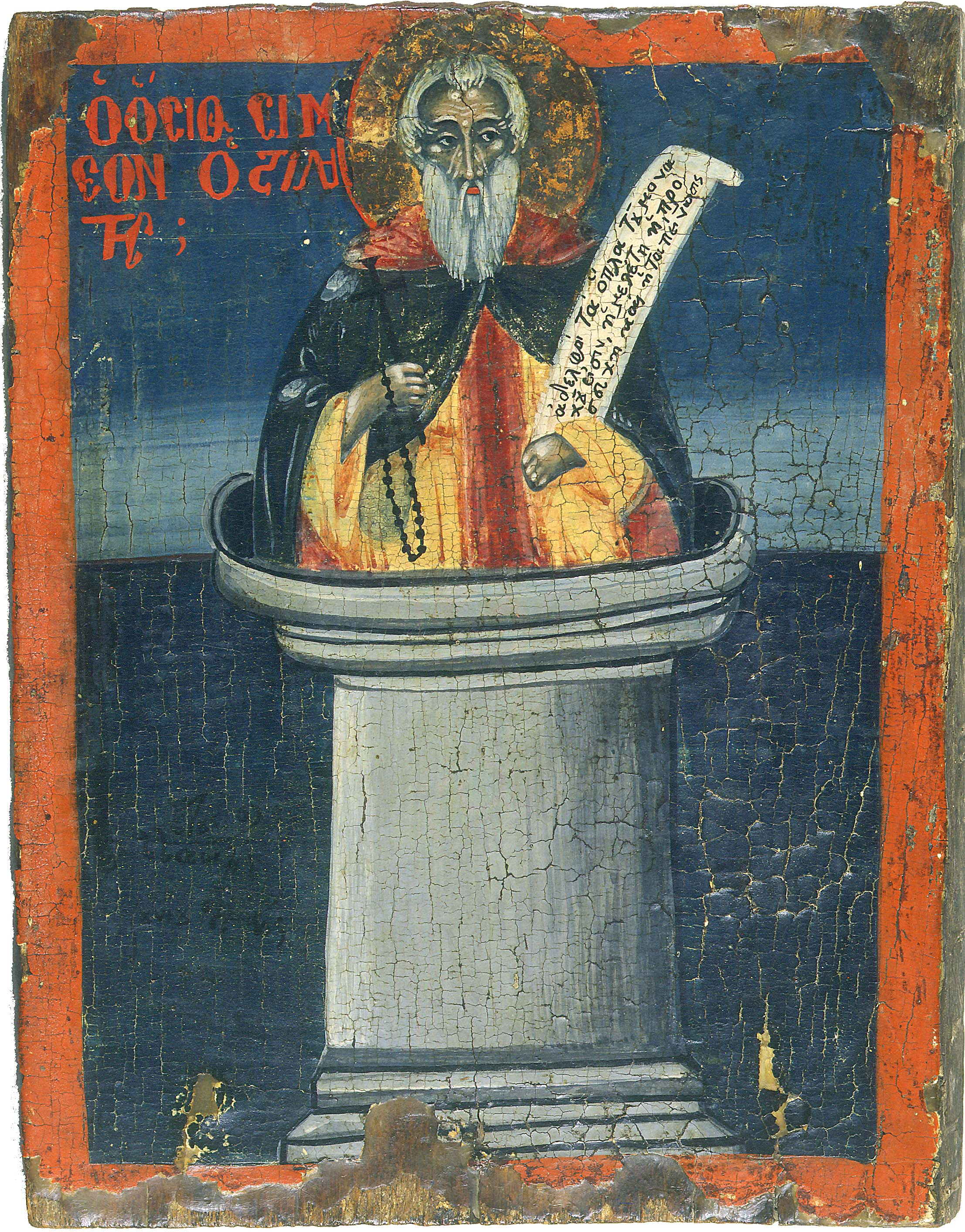 Syméon le Vieux dit Saint Syméon le Stylite est un moine de Syrie. On le surnomme le Stylite car il a vécu en haut d'une colonne.